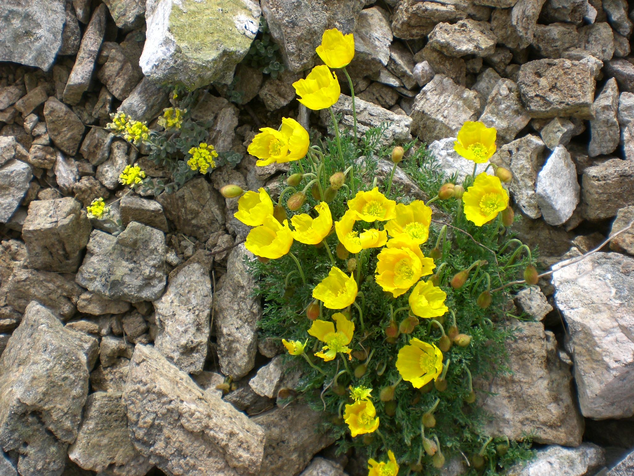 Пирин, Пирински мак (Papaver degenii) - български ендемит, глациален реликт. Включен в Червената книга на България. Защитен вид по Закона за биологичното разнообразие.